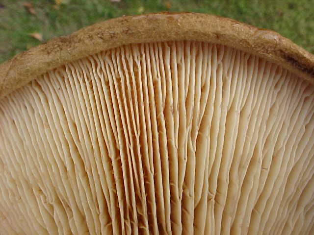 Paxillus involutus (Batsch) Fr.